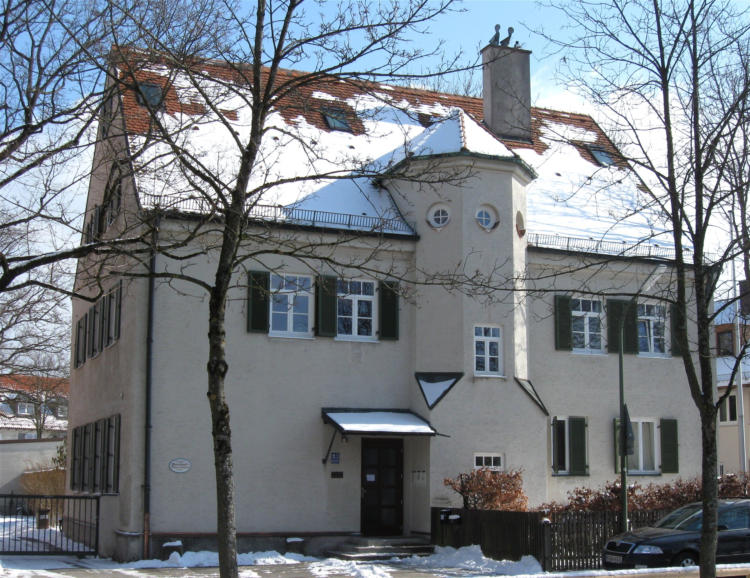 Sebastian-Bauer-Straße 23; Evang.-Luth. Pfarrhaus, 1903 von Theodor Fischer; z. T. verändert; München-Perlach